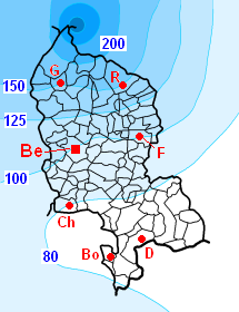 carte des précipitations dans le Territoire de Belfort pendant le mois de décembre 2005. Dessinée le 7/3/2005 par F5ZV à partir de données Météo-France